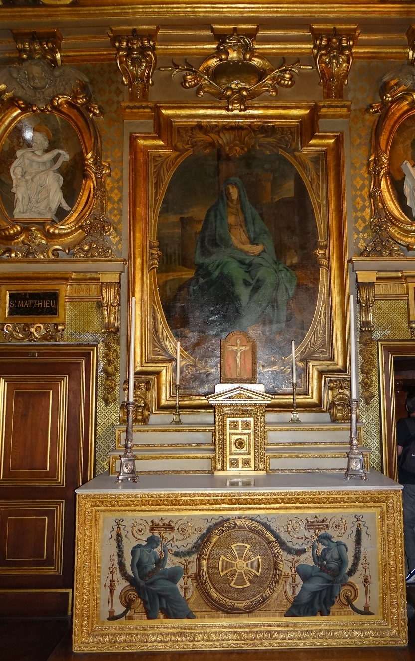 Palais du Luxembourg .